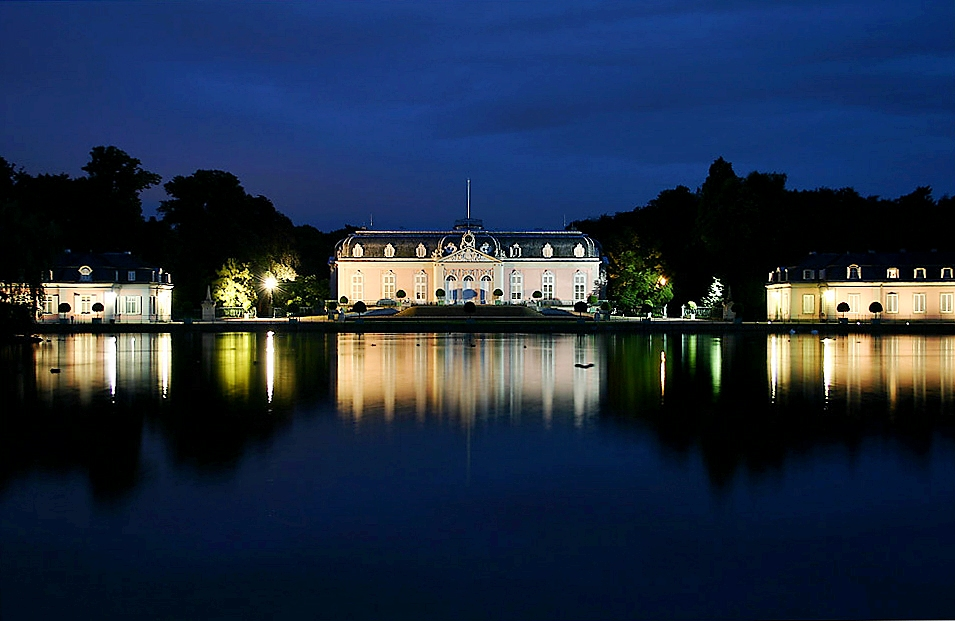 Schloss Benrath zur Blauen Stunde